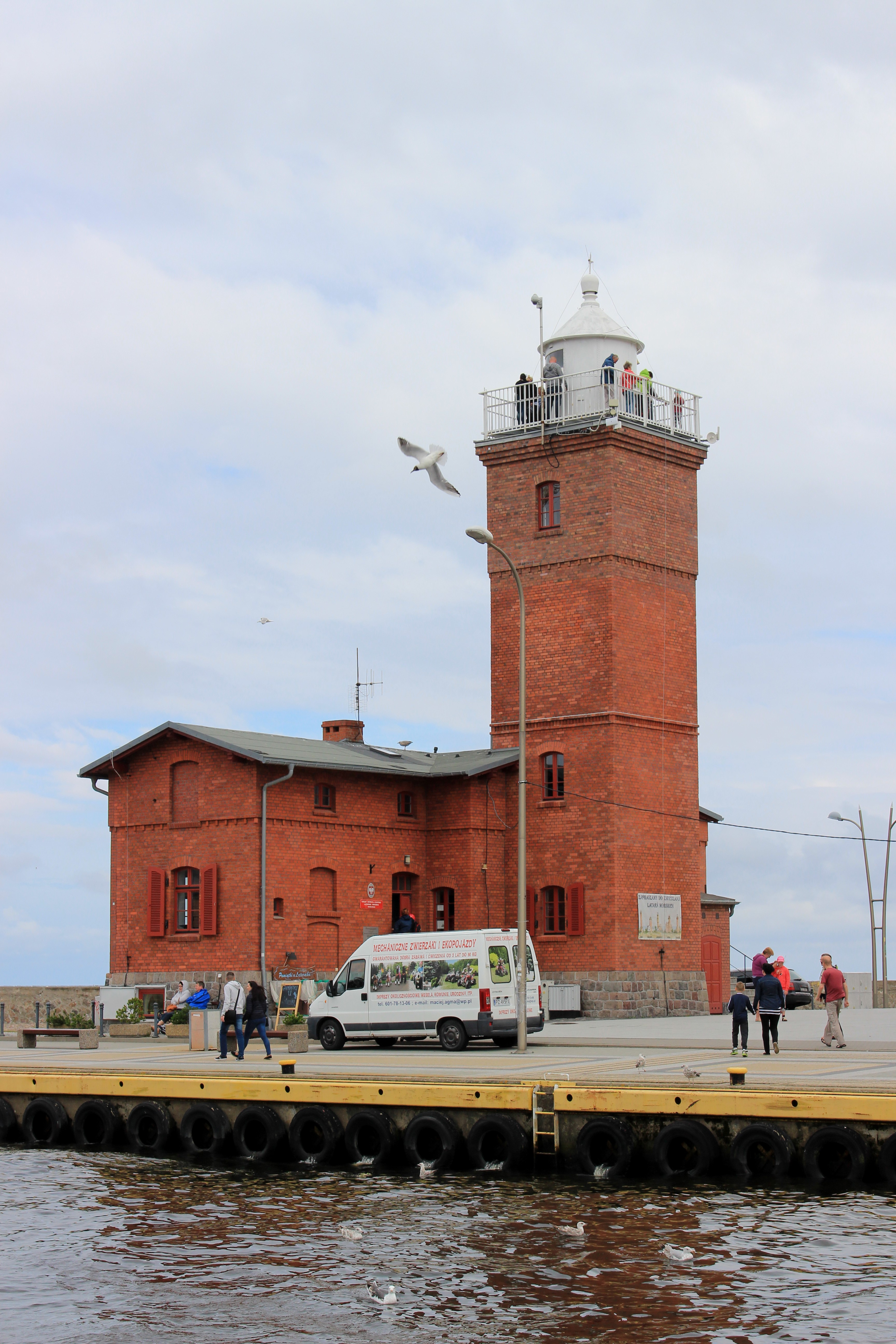 Latarnia Morska w Darłówku